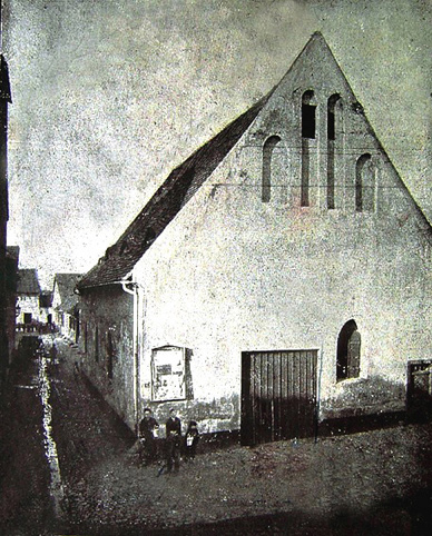 Älteste Fotografie der Heiliggeistkirche Calbe (ca. 1900)